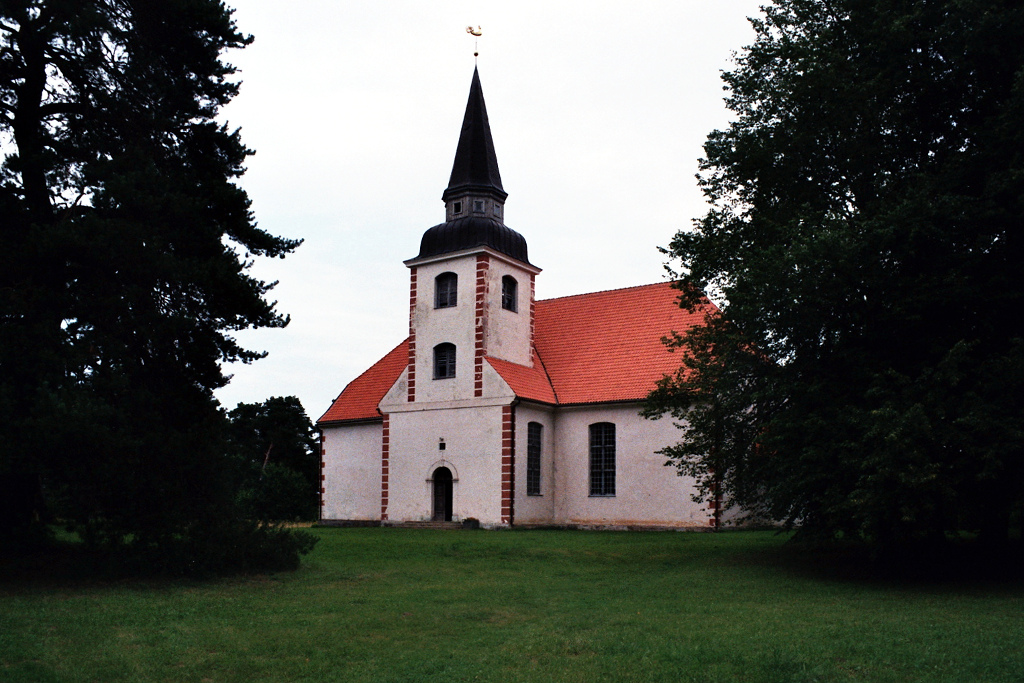 Kirche Pernigel/Liepupe, Lettland